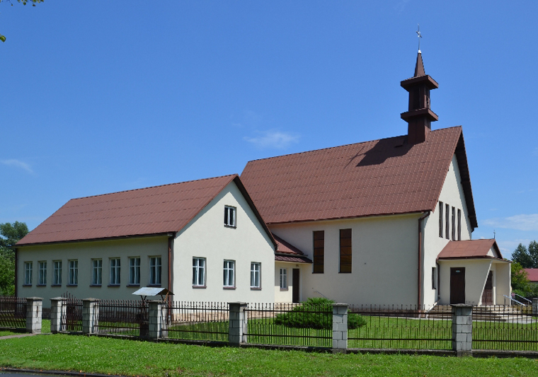 Kaplica w Wampierzowie jest położona przy drodze prowadzącej z Wadowice Górnych do Kawęczyna i dalej do Brnia Osuchowskiego. Plac, na którym postawiona jest kaplica składa się dzisiaj z dwóch działek. Pierwsza została zakupiona przed II wojną światową przez Ruch Ludowy. Postawiono tam sklep. Działania wojenne zniszczyły zabudowania w 1944 roku. Na przełomie lat 1982 i 1983 zrodził się początkowo pomysł budowy domu katechetycznego. Niedługo późnej zmieniono plan i do zaplanowano budowę kaplicy kościelnej wraz z domem katechetycznym. Wówczas druga działka została oddana przez Czecha Franciszka. Budowę rozpoczęto w 1984 roku, którą ukończono 3 lata później w 1987 roku. Budowę prowadził Czech Franciszek a nadzór budowlany sprawował Działo Aleksander. Tegoż samego roku została poświęcona przez bpa tarnowskiego.Jest to kościół filialny św. Wojciecha. Kaplica jest wybudowana z cegły, tynkowana w wewnątrz i z zewnątrz, dach dwuspadowy, pokryty blachą.